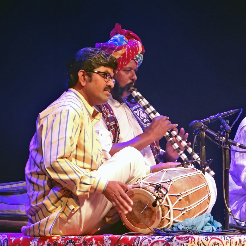 Musiciens de l'ensemble Divana Mehrudeen Langâ à la flûte satara et Firoze Khan Manghaniyar au tambour dholak La flûte Satara est une double flute à bec : l'une sert de bourdon, l'autre est une flute mélodique sur laquelle on joue. Spectacle "A la rencontre des poètes et musiciens du Rajasthan (Inde du nord)" dans le cadre du festival Les Orientales Musiques et traditions d'Orient Saint-Florent-le-Vieil